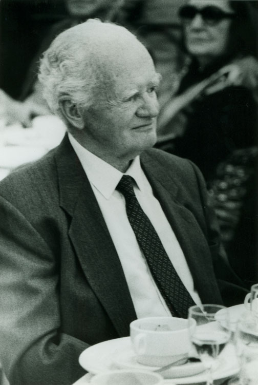 Julio Philippi Izquierdo, Ministro de diversas carteras de Chile durante el gobierno de Jorge Alessandri (1958-1964).